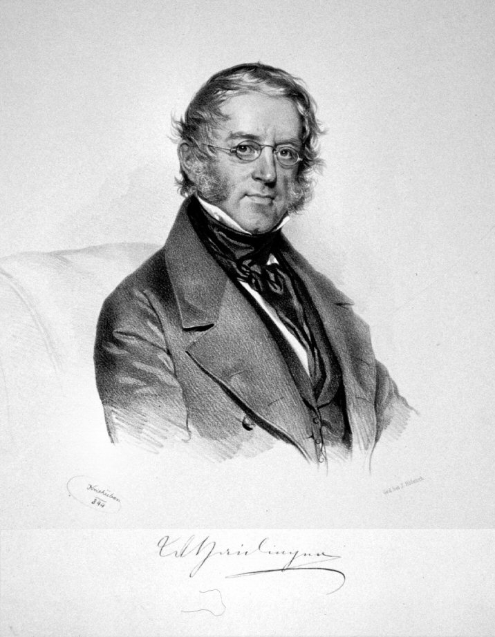 Wilhelm Karl Ritter von Haidinger, Lithographie Originallithographie im Besitz von User:Peter_Geymayer.